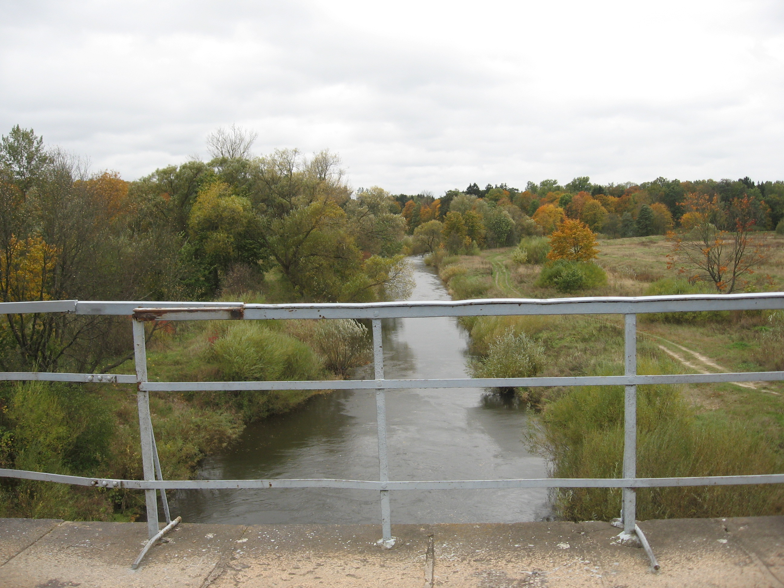 Šyšos upė nuo tilto